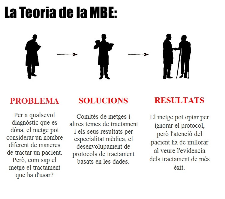 Procès de la MBE